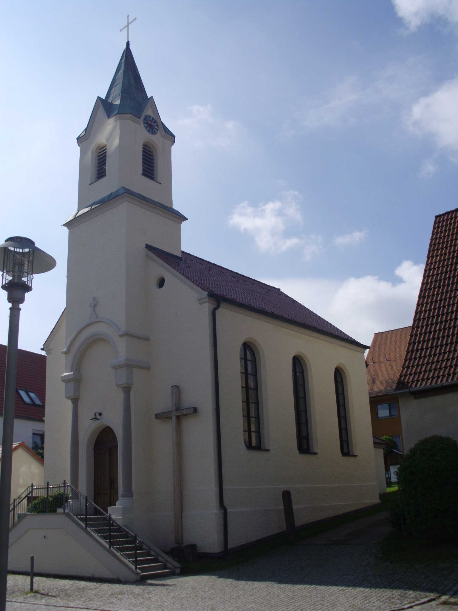 Kath. Kirche St. Josef in Ramsberg am Brombachsee, Frontseite